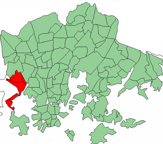 Map of Helsinki highlighting Munkkiniemi